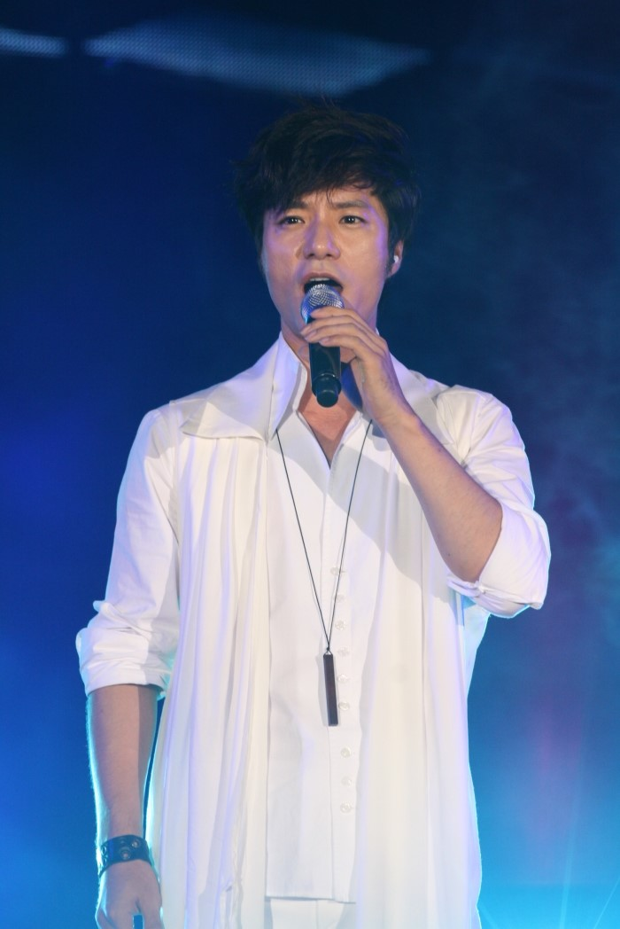 팝페라 가수 임태경